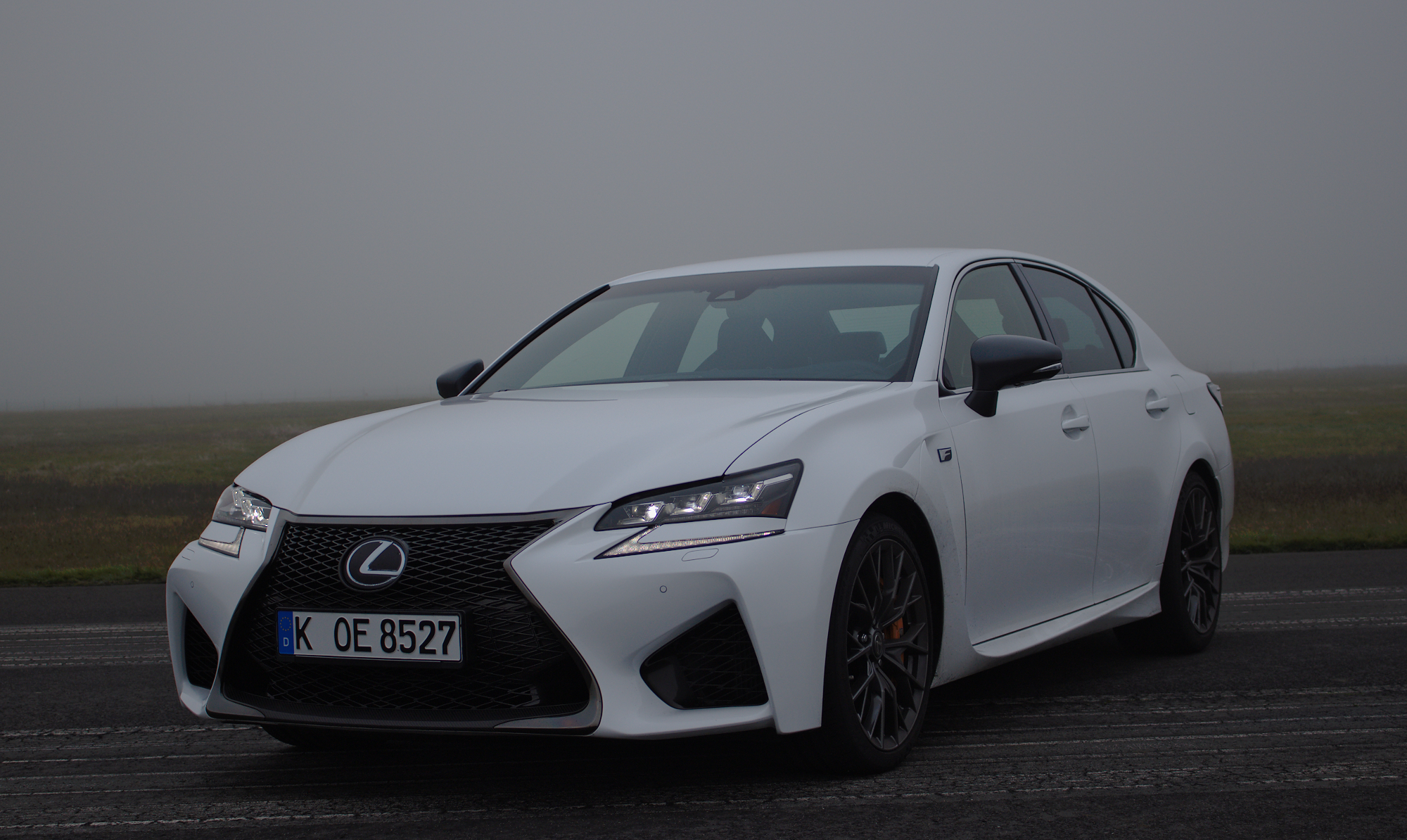 2016 Lexus GS-F Vorderansicht